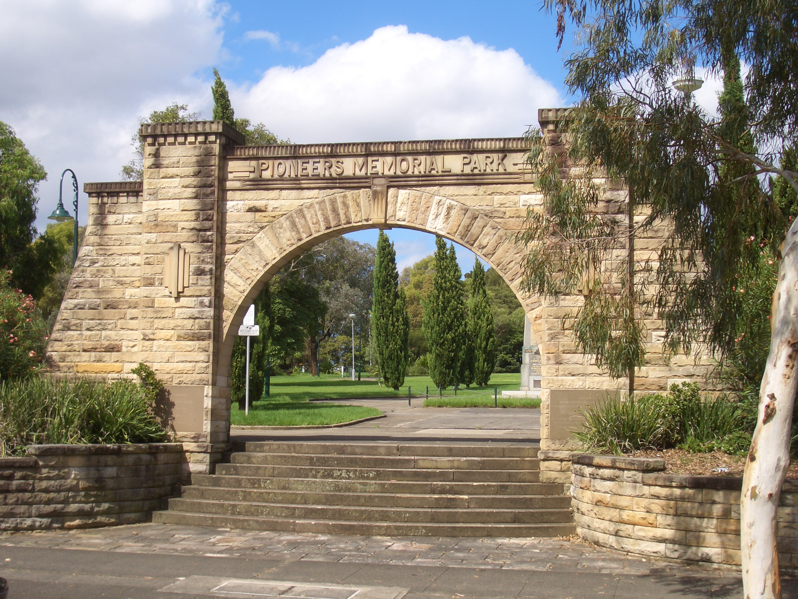 Leichhardt, Pioneers Memorial Park